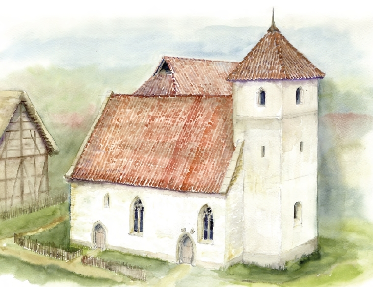 Rekonstruktion 3. Bauphase (13. Jahrhundert) durch Prof. B. Scholkmann, Tübingen